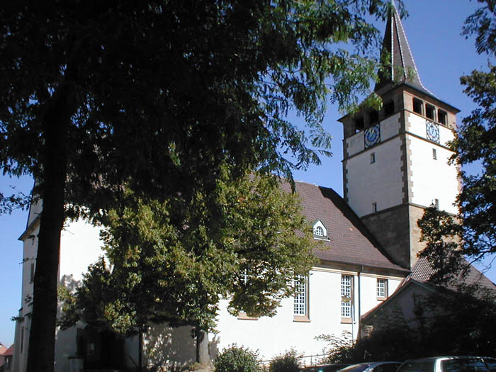 Rückwärtige Ansicht der Lorenzkirche in Großgartach (Leingarten)